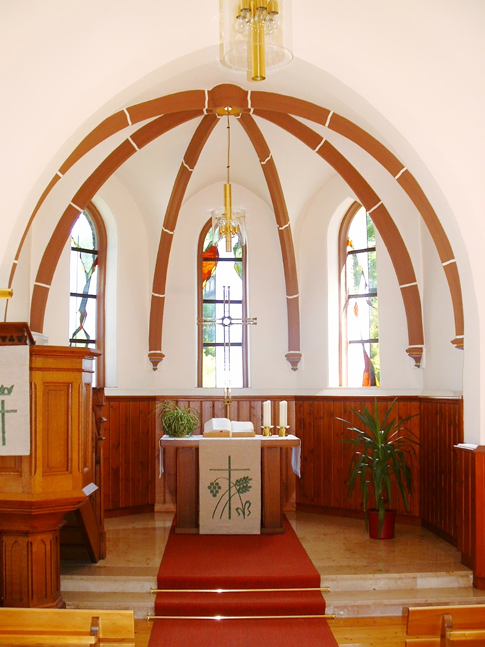 Evangelische Kapelle in Kautenbach, einem Ortsteil von Traben-Trarbach